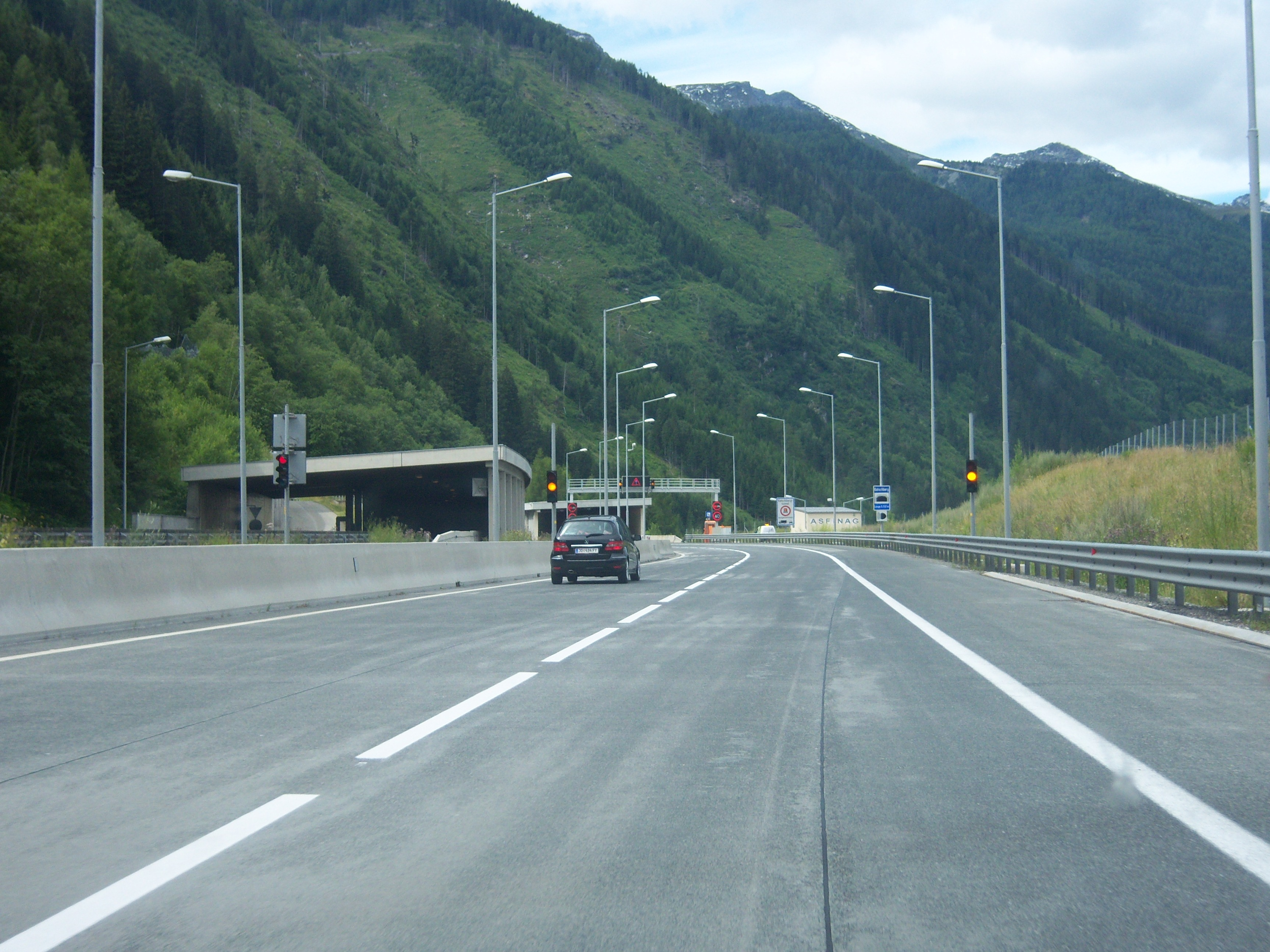 Tauern Autobahn A10 Richtung Villach vor dem Nordportal des Katschbergtunnel